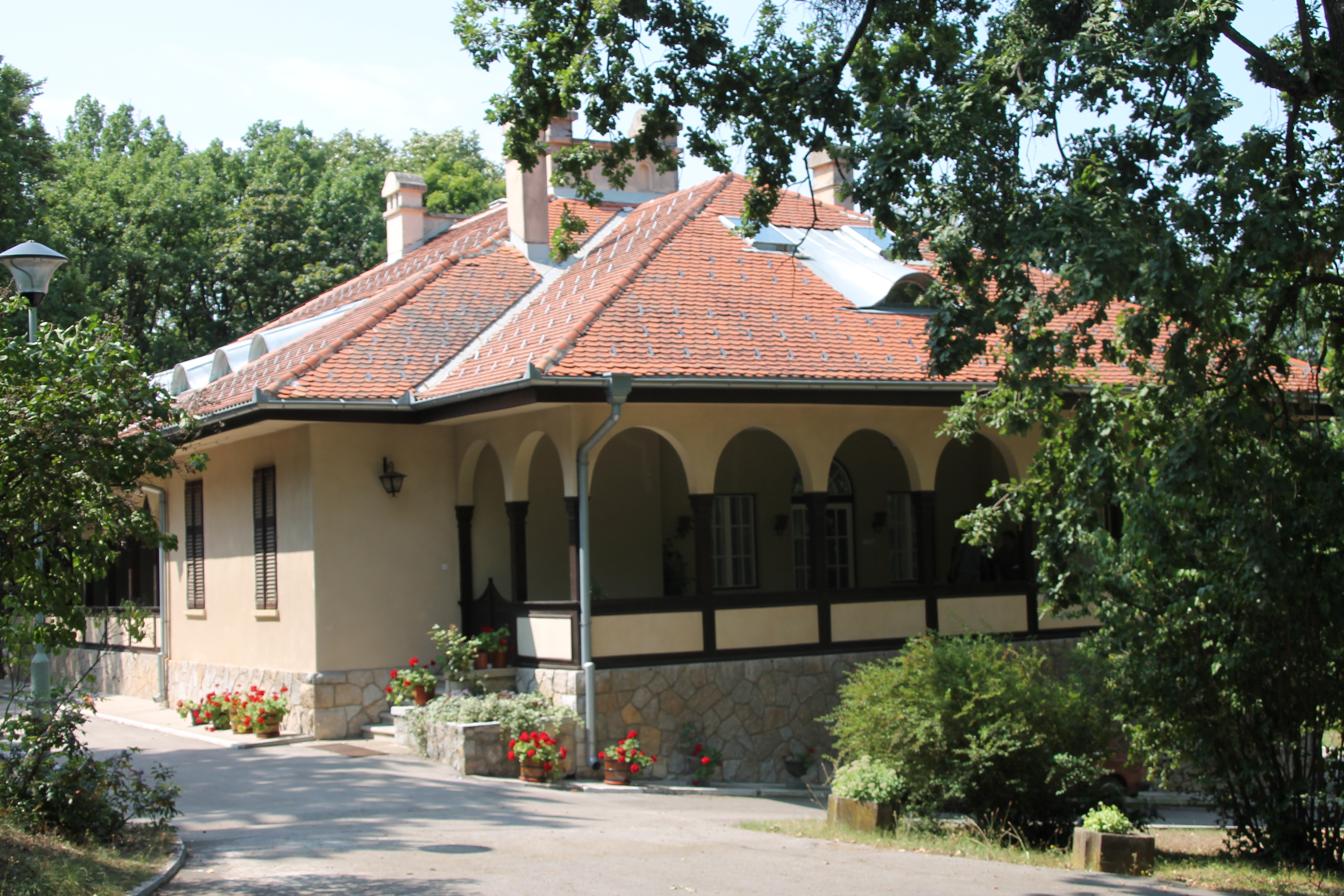 Kraljičina vila